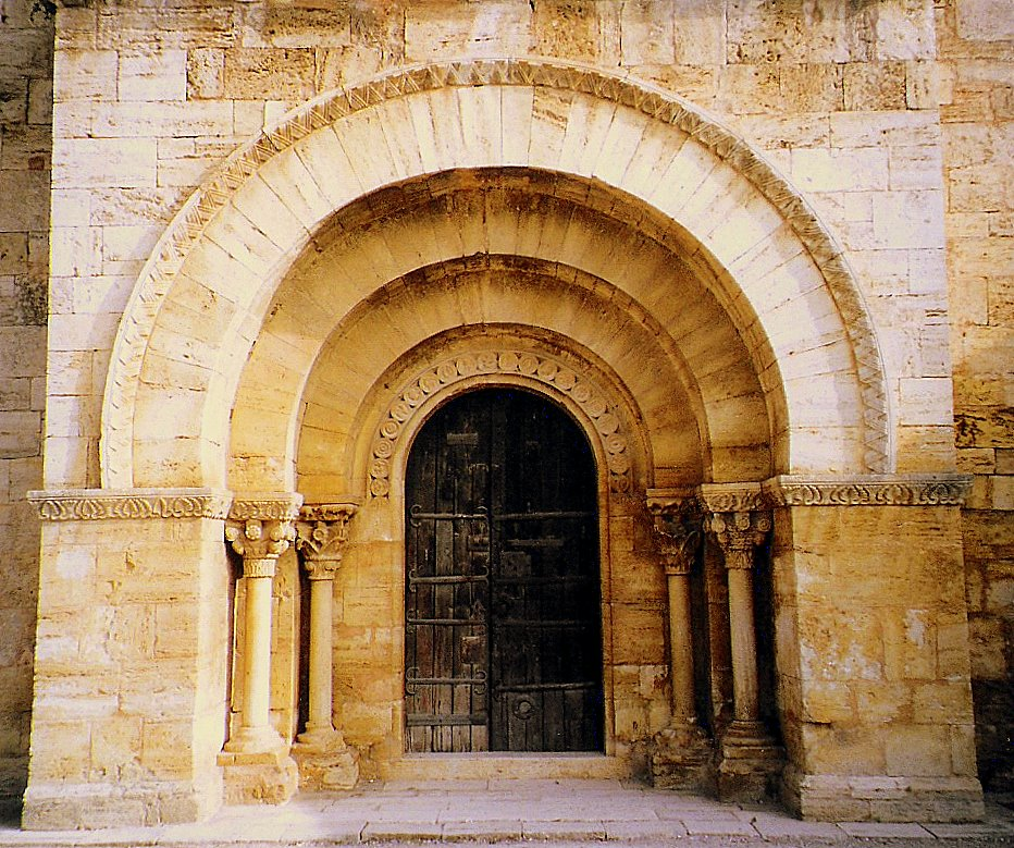 PORQUERES - Església de Santa Maria. Segle XII (Pla de l'Estany, Catalonia)